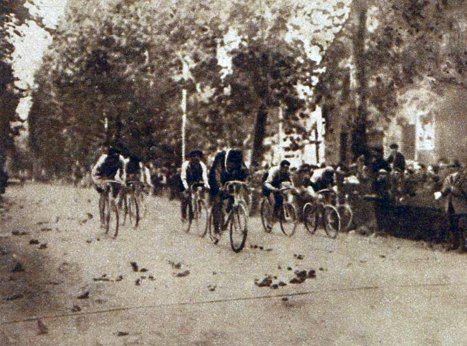 Henri Pélissier, vainqueur au sprint du Tour de Lombardie en 1911.